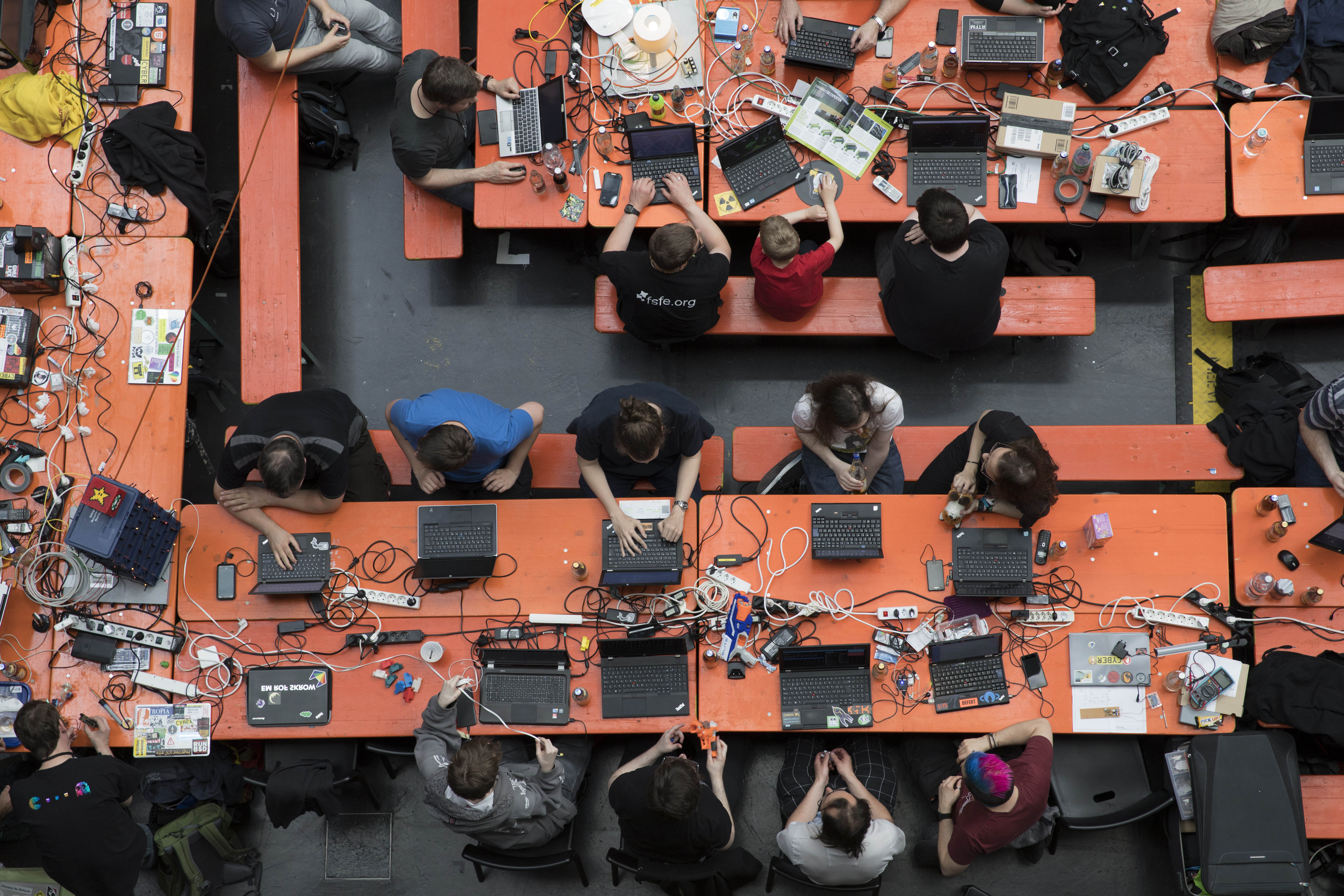 Impression von Oben der 19. Gulaschprogrammiernacht